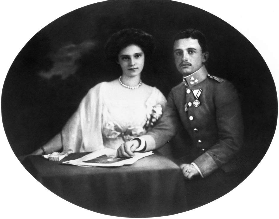 L’empereur Charles I et l’impératrice Zita d'Autriche